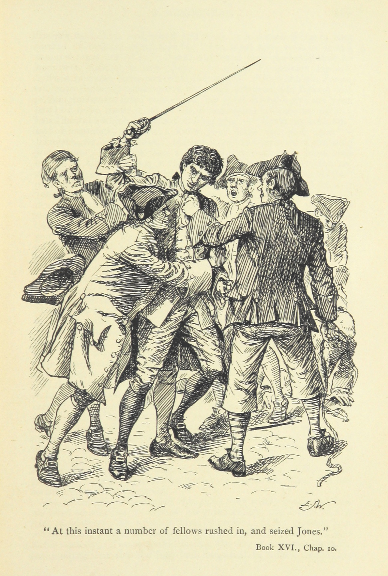 The History of Tom Jones, a foundling, (Tom Jones) Illustration pour le Tome XVI, ch.10